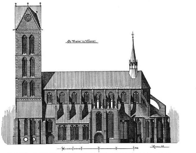 Zeichnung der Südansicht der Marienkirche in Wismar